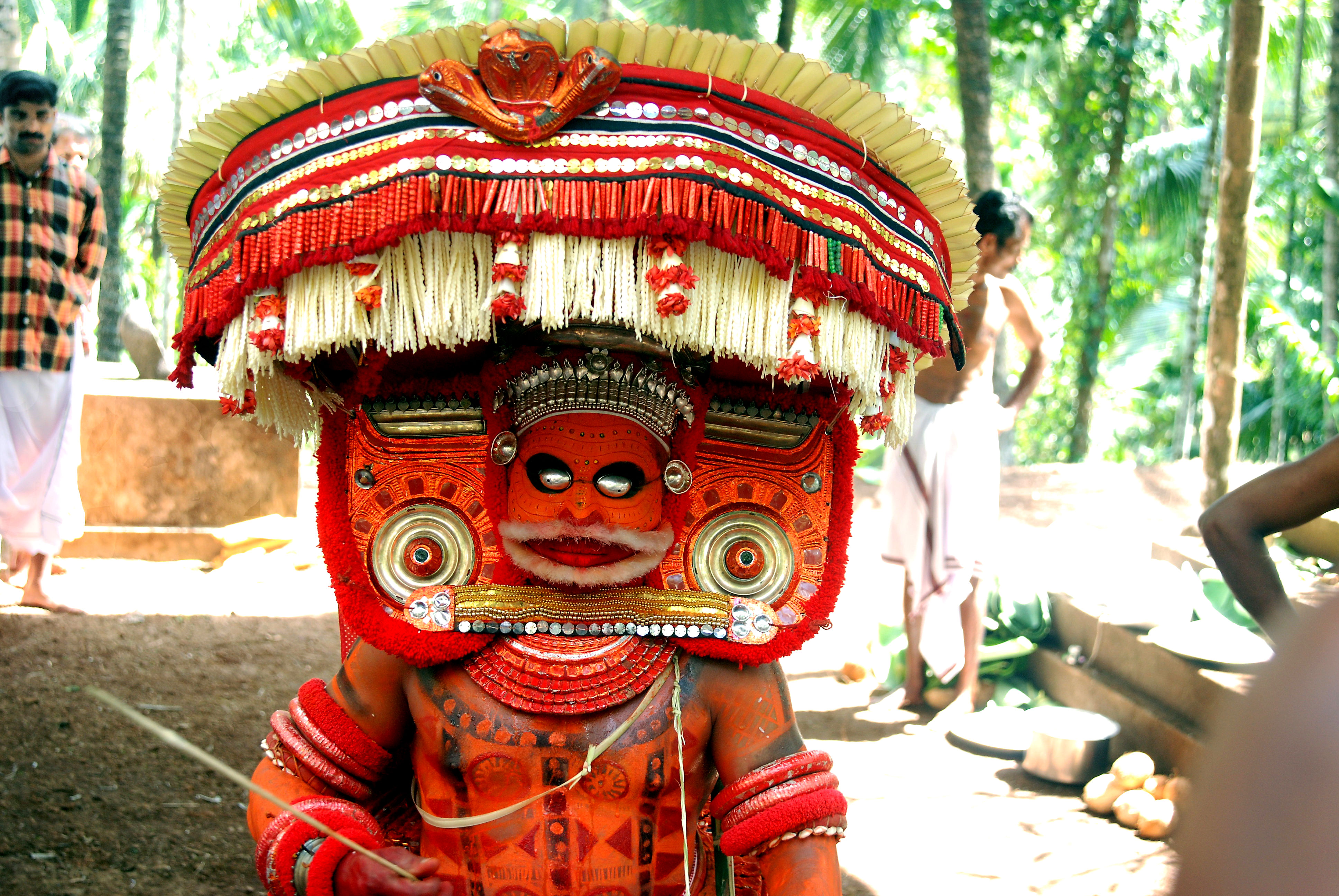 പൊയ്‌ക്കണ്ണണിഞ്ഞ കാലിച്ചാൻ തെയ്യം